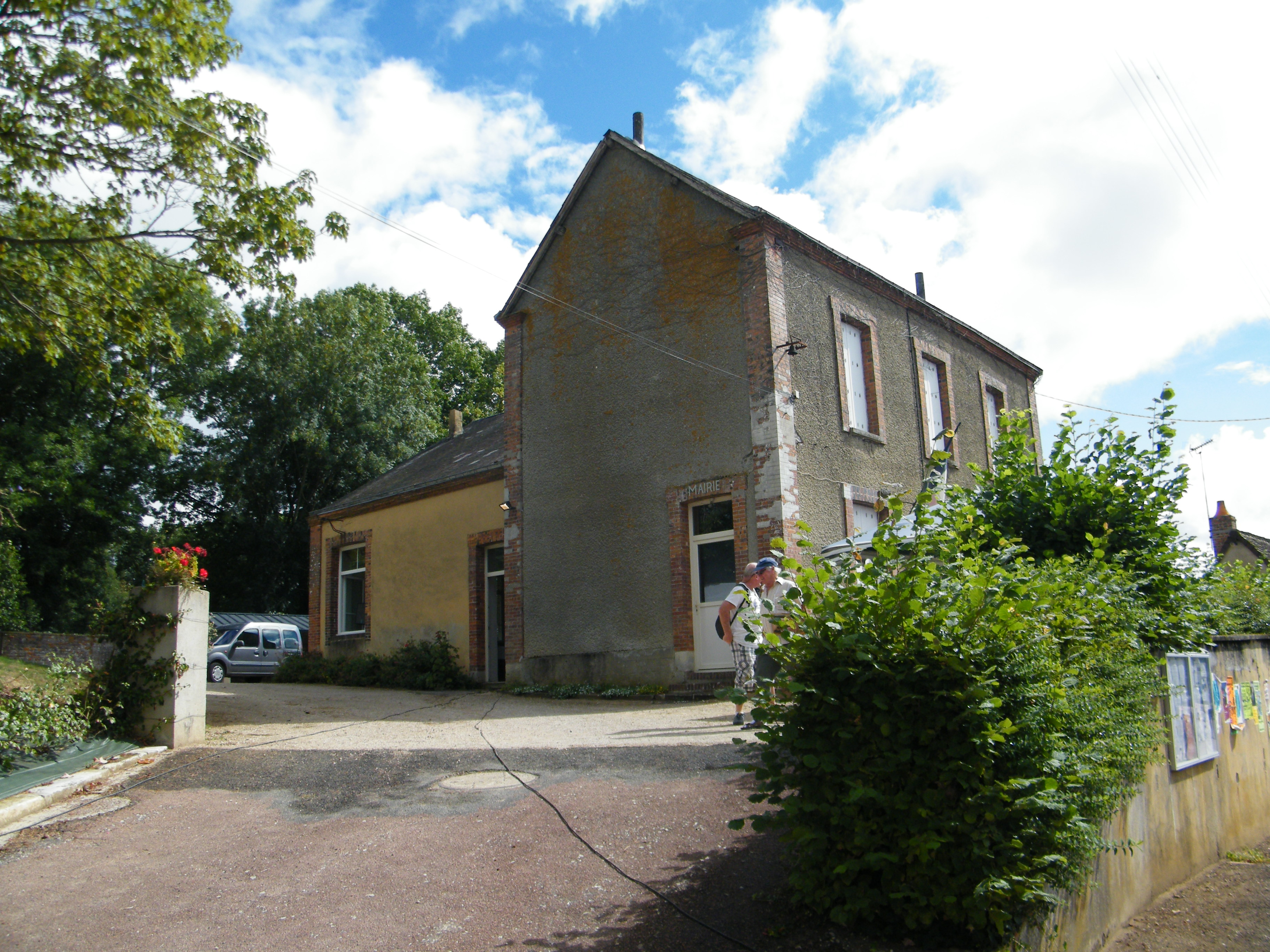 Le Plessis-Dorin, Loir et Cher, Fr, mairie